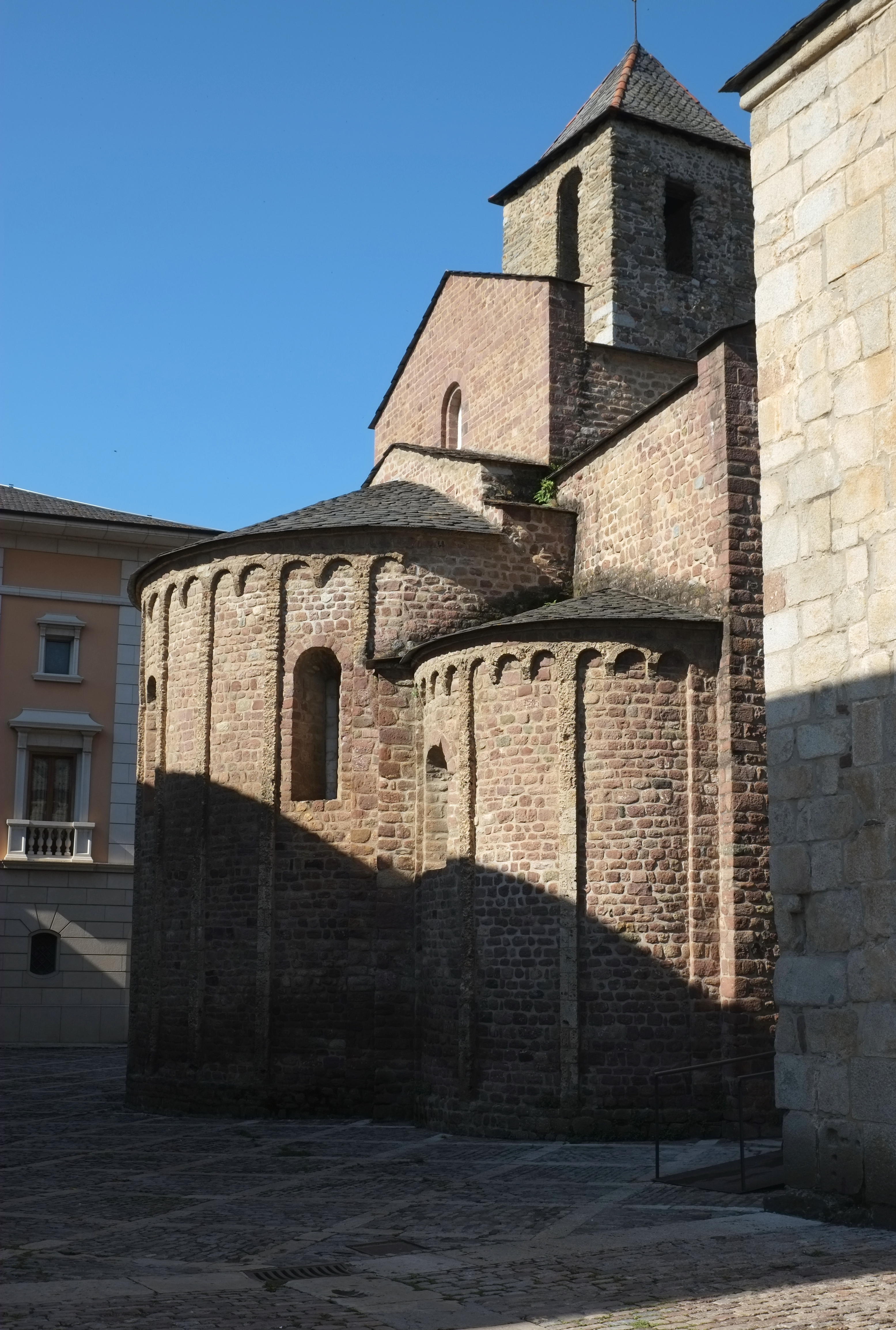 Kirche San Miguel in La Seu d’Urgell (Spanien)